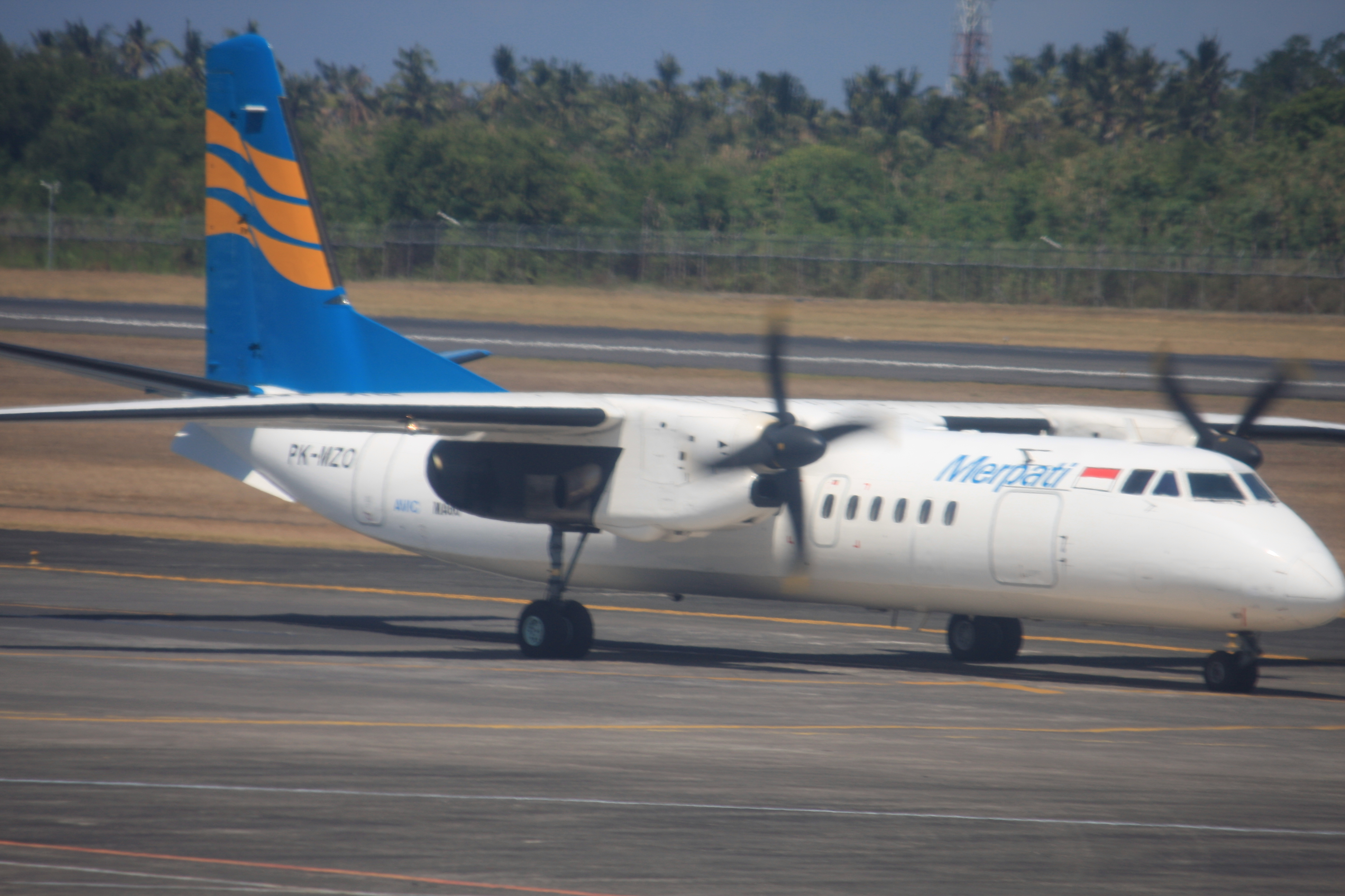 Denpasar / Bali - Ngurah Rai International (DPS / WADD) Indonesia, August 24, 2012.